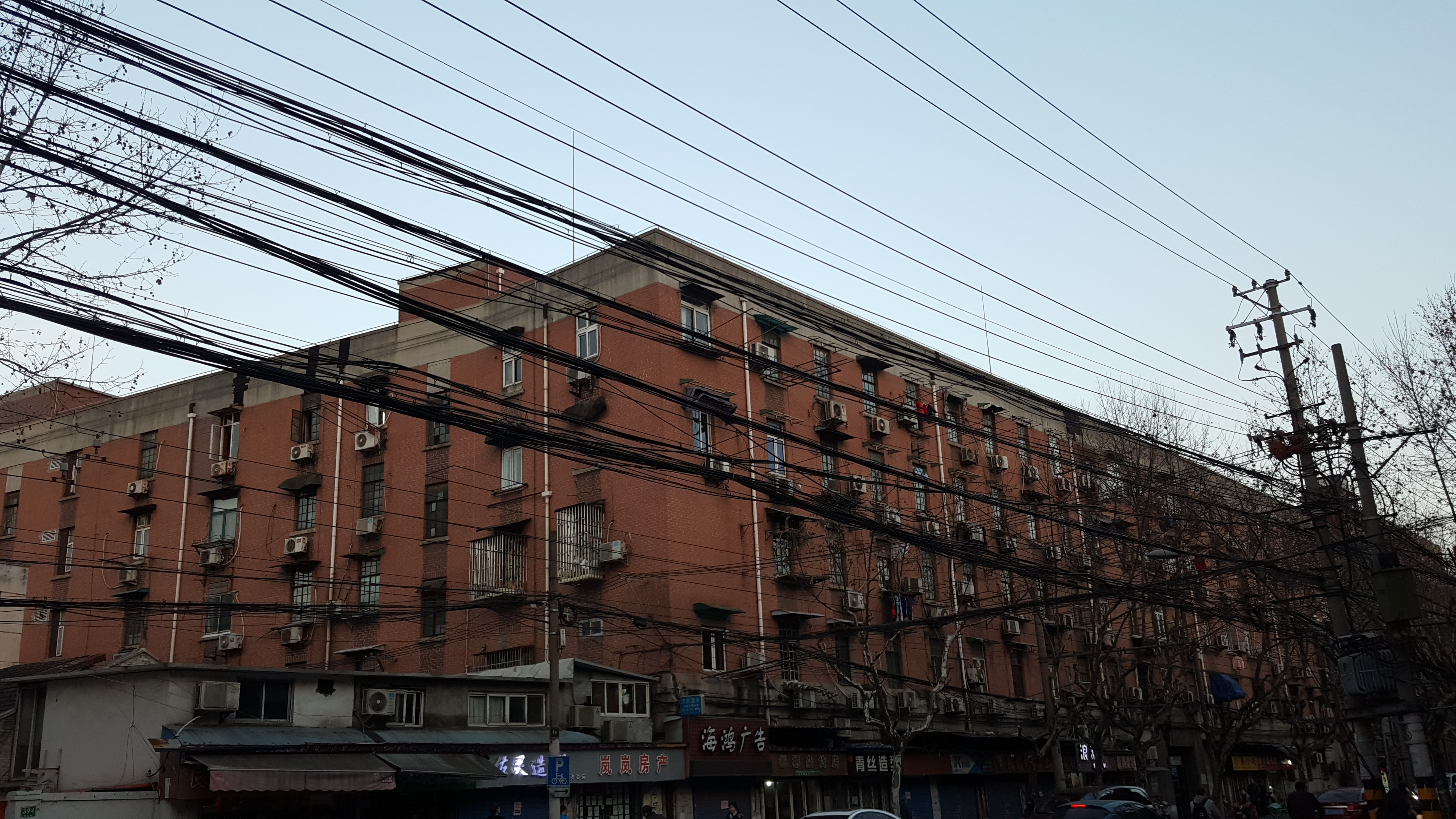 隆昌公寓西、北立面，隆昌公寓是上海市第五批优秀历史建筑